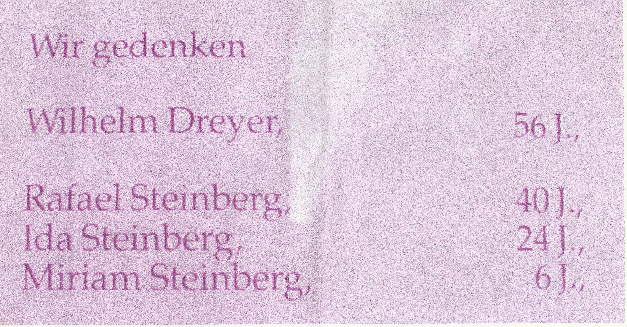 לוחית על בית מבתי היהודים